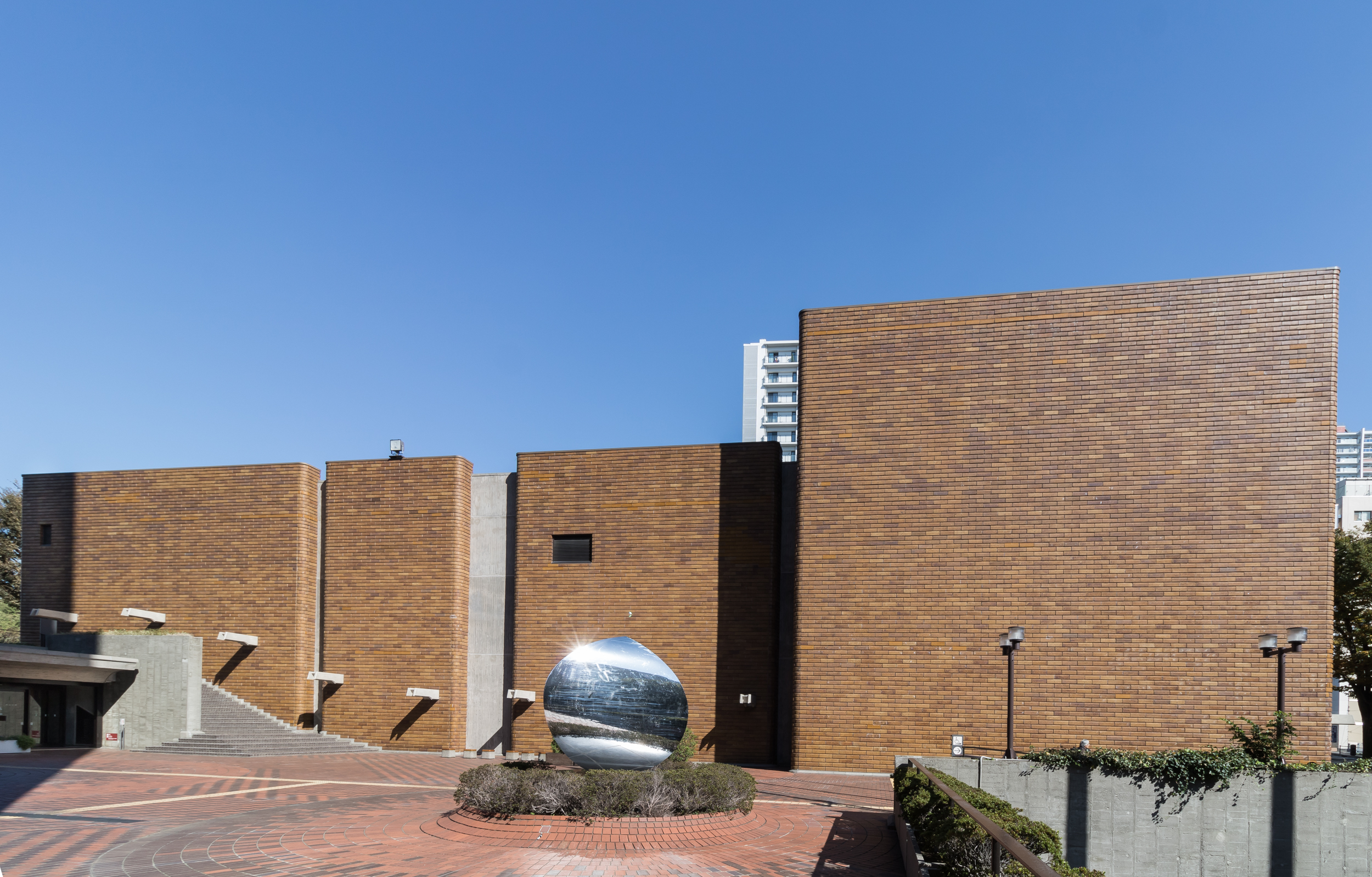 埼玉会館。前川國男設計（1966）